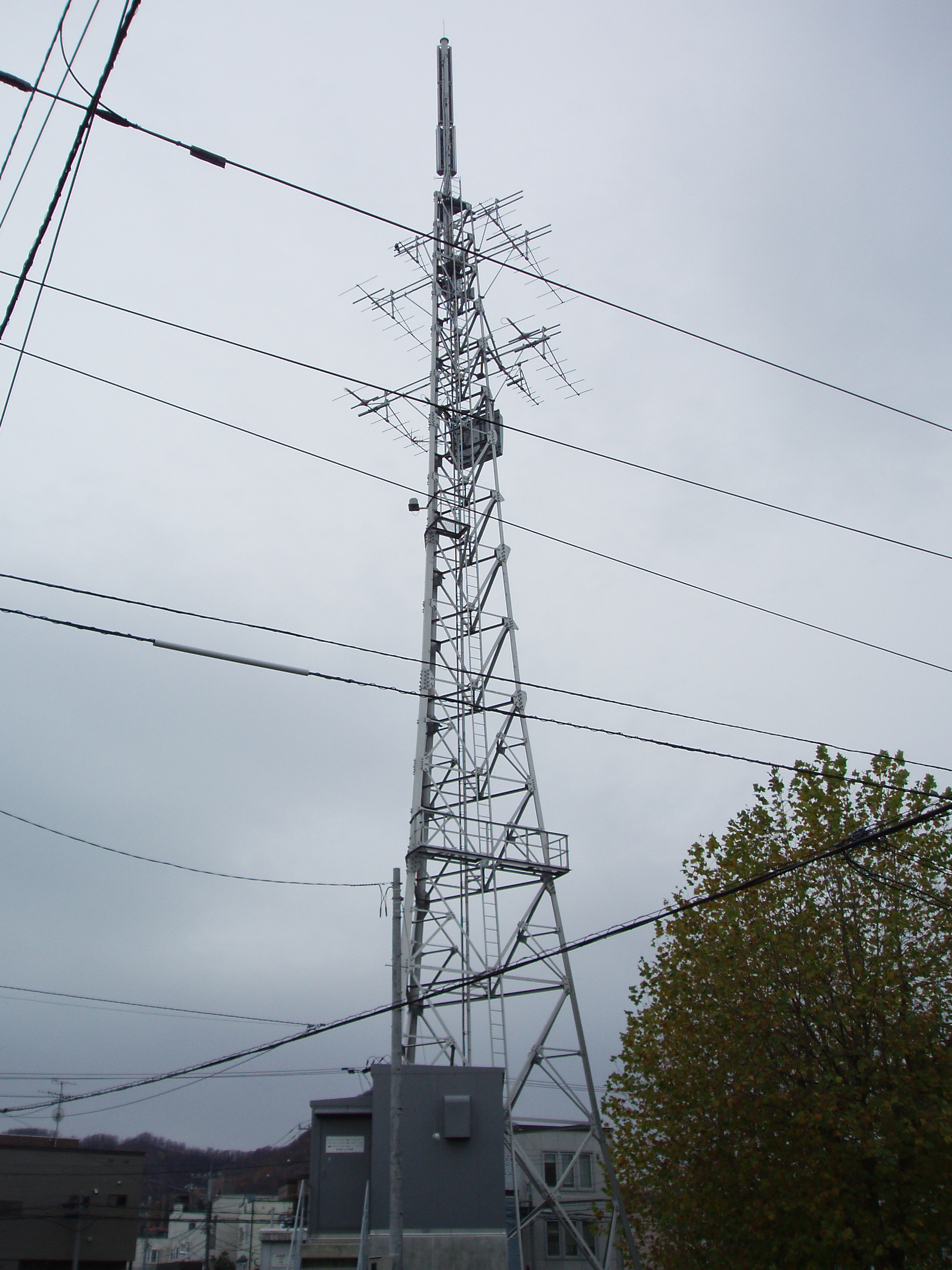 宮の森中継局（アナログ・デジタル）